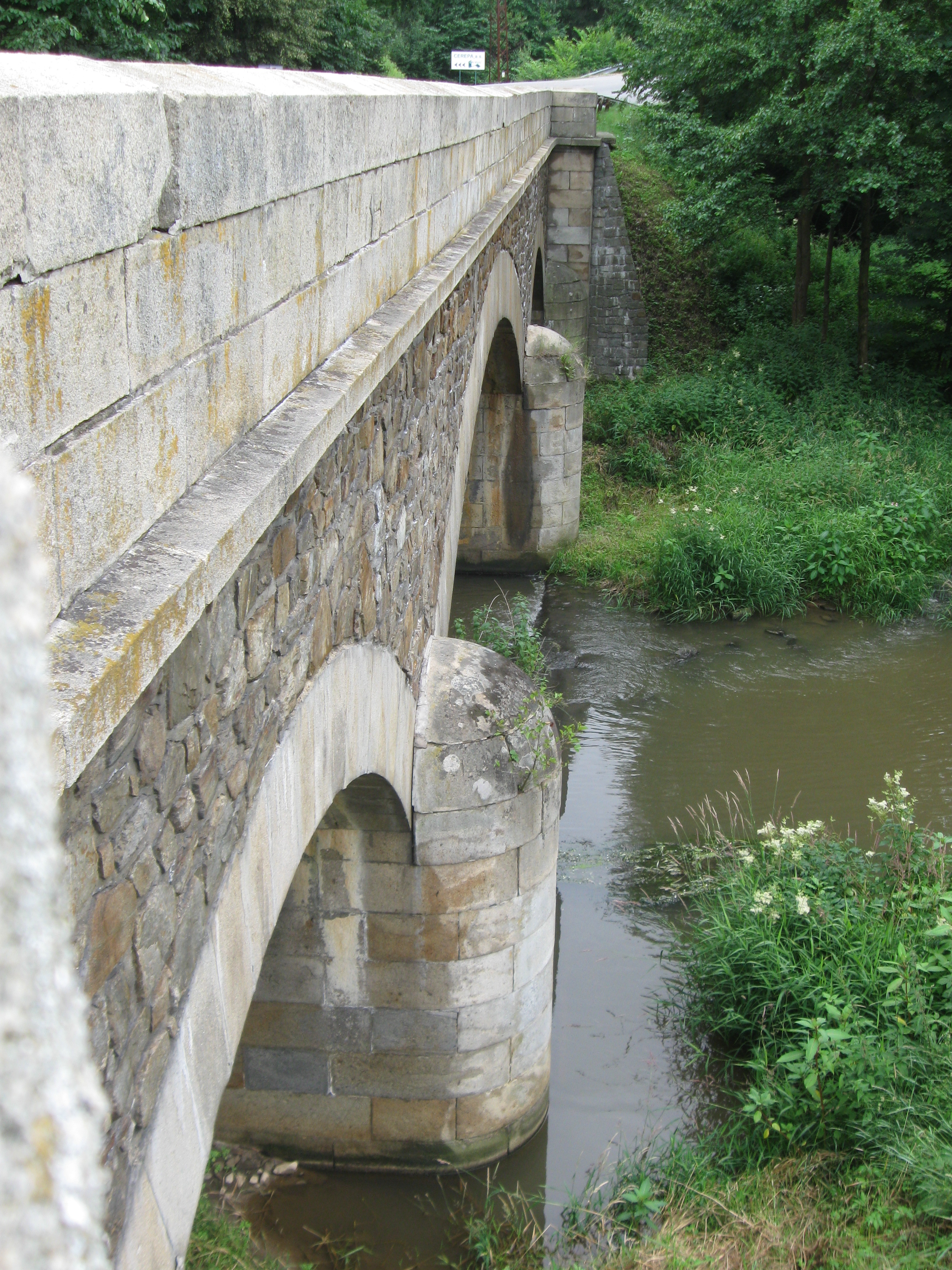 Křelovice, okres Pelhřimov, most přes řeku Trnavu na silnici II/112 do Červené Řečice.